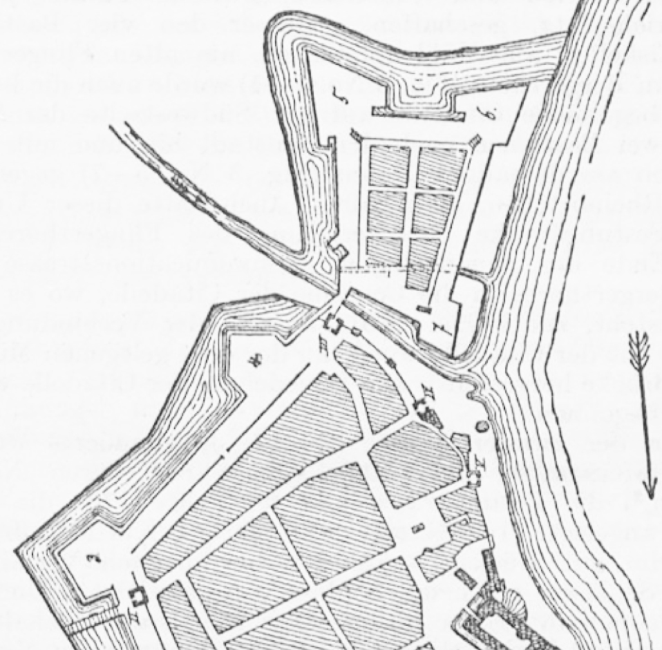 Plan von Düsseldorf im Jahr 1620, Ausschnitt aus file:Plan von Düsseldorf 1620.jpg